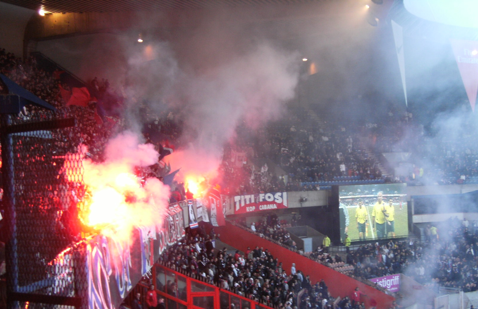 Fumigènes à Boulogne lors de PSG 2-1 Sochaux